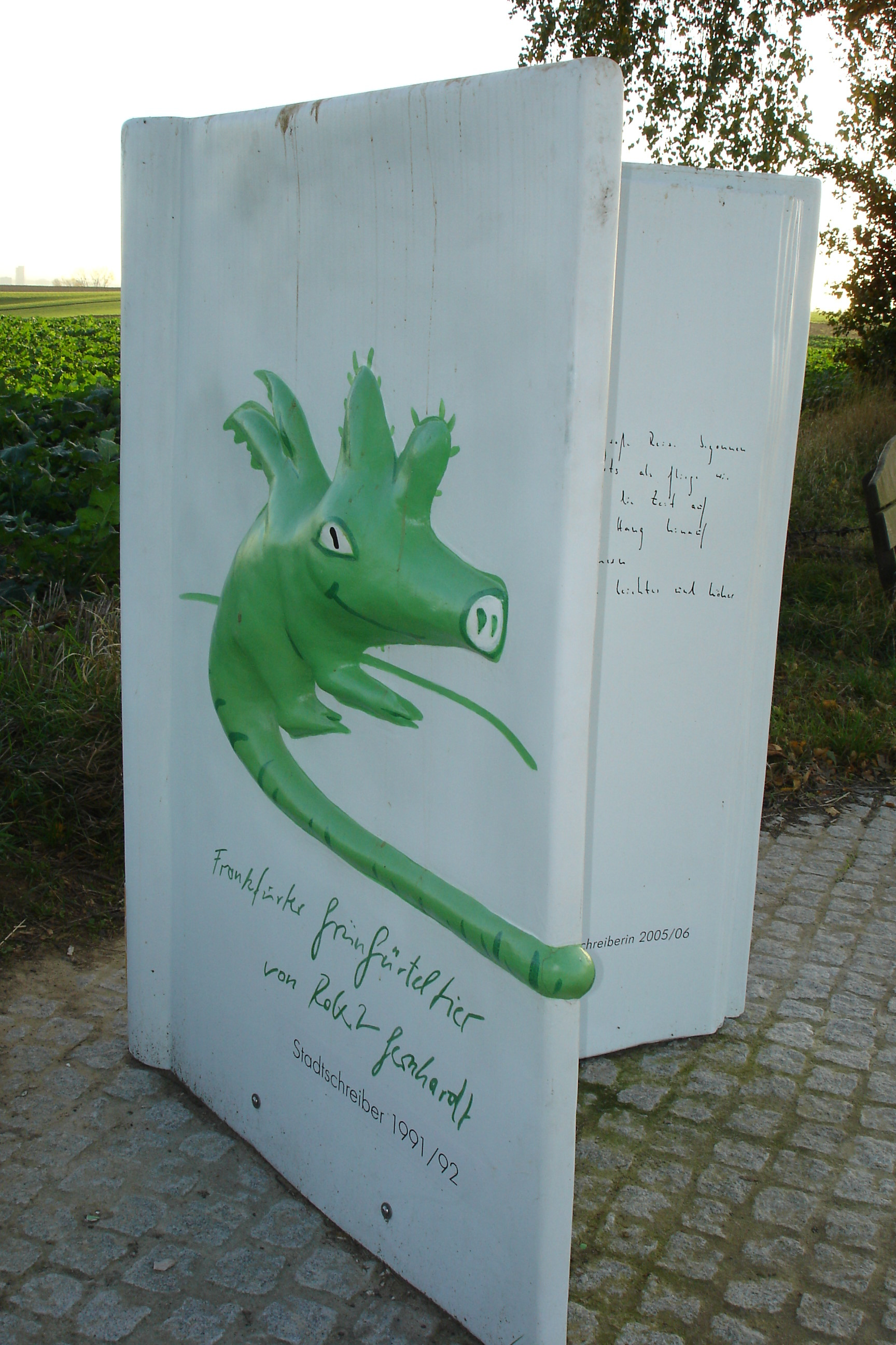 Gruenguerteltierstation am Rundwanderweg auf dem Berger Ruecken